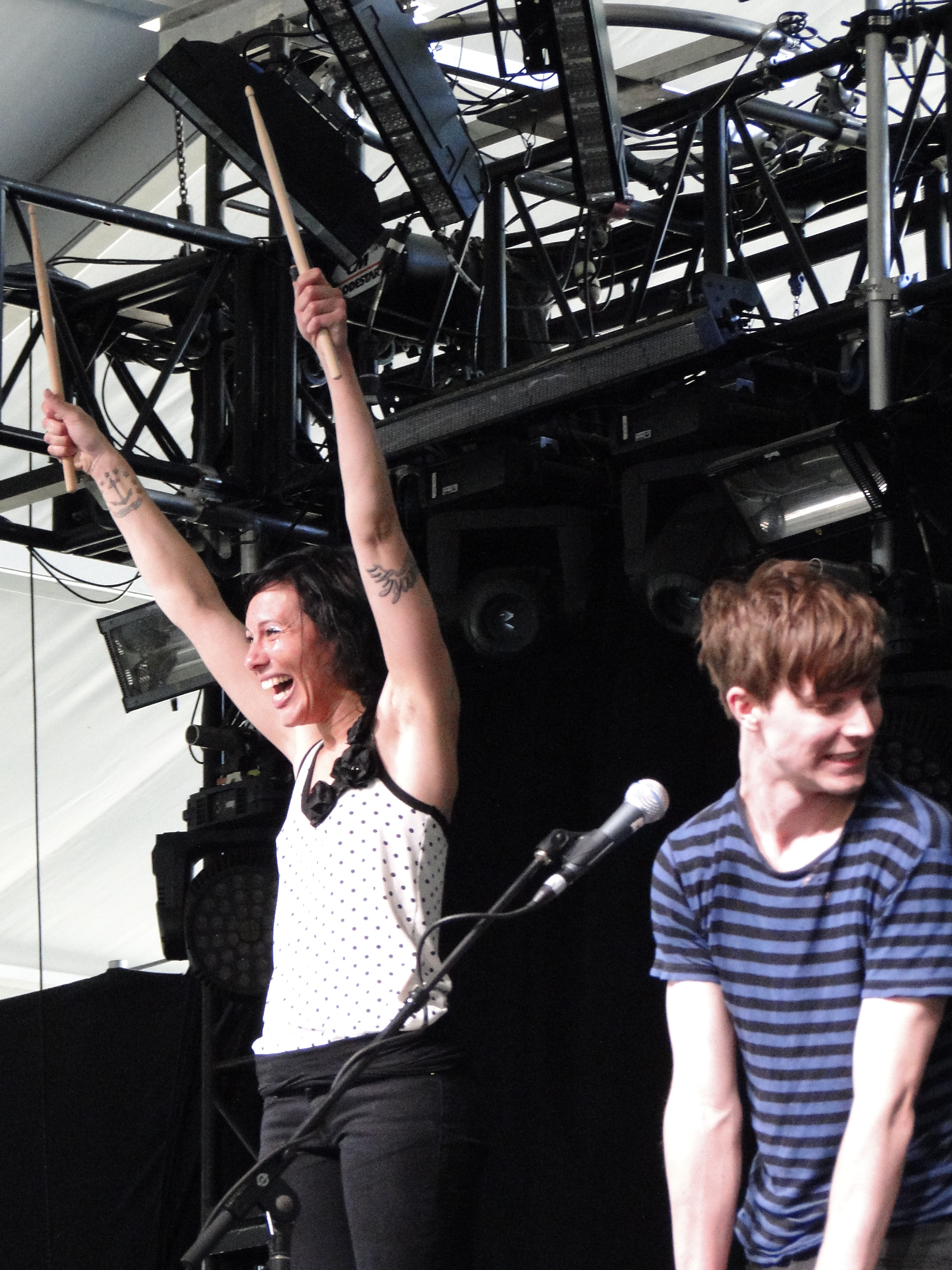 Matt & Kim - Coachella 2010